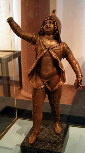 Bronzestatue von Attis, im Rheinisches Landesmuseum Trier